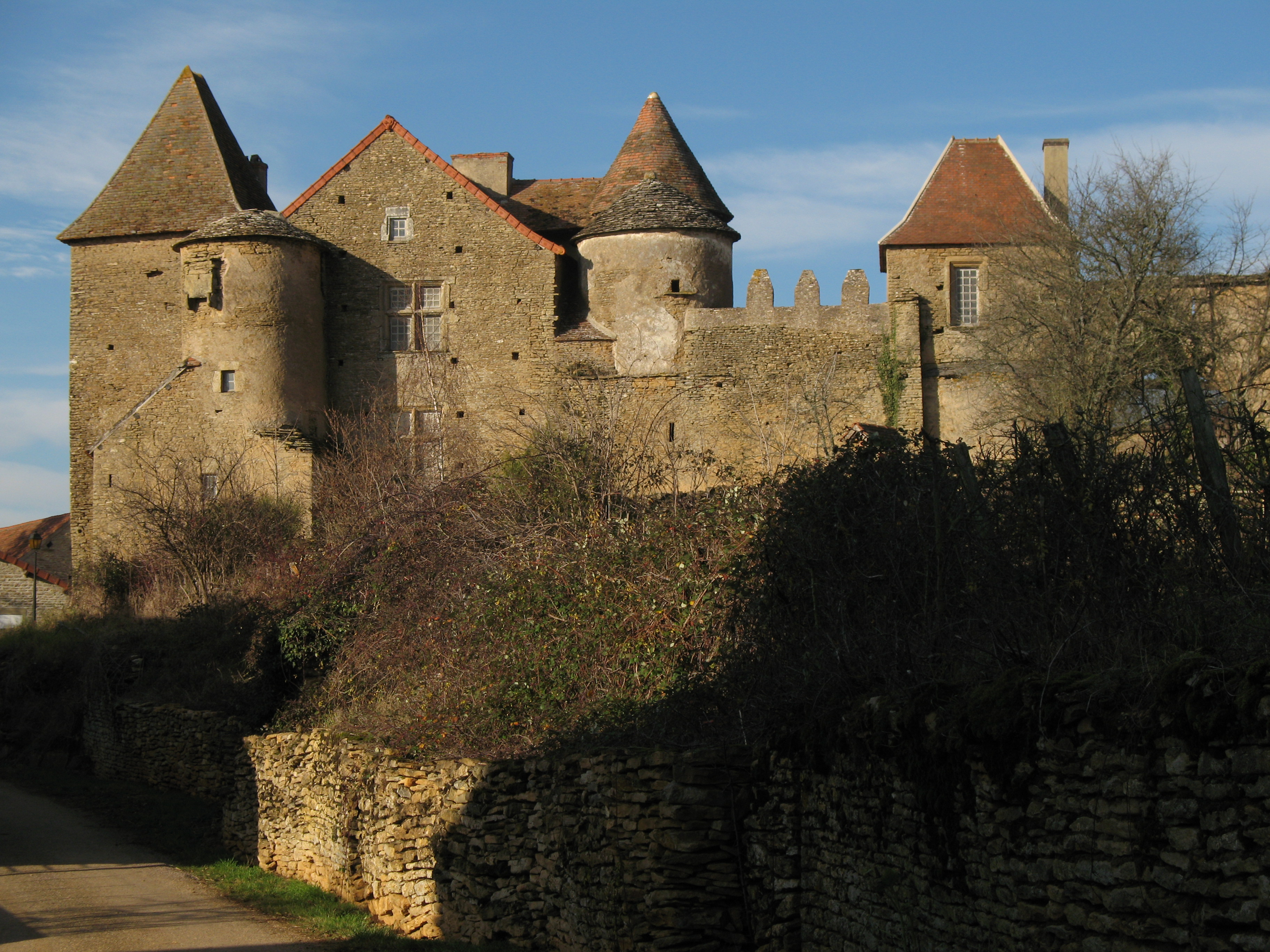 château de Bissy-sur-Fley (Saône-et-Loire)